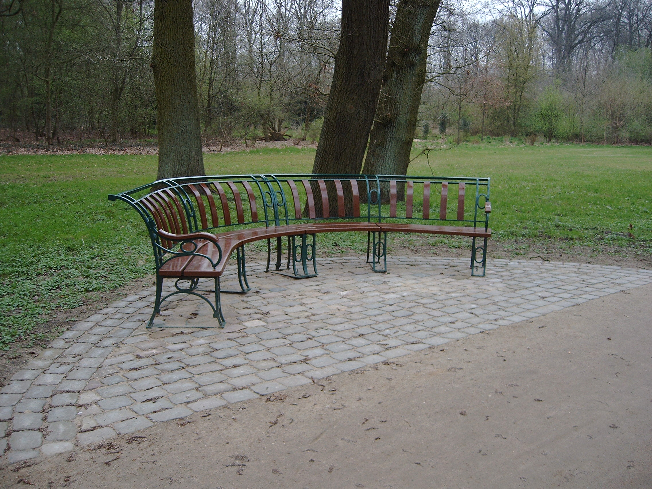 Amelie-Ziermann-Bank Diese Bank war die erste von Justus Leidenberg gefertigte Bank und diente als Vorlage für viele weitere ähnliche Bürgerparkbänke. 1893